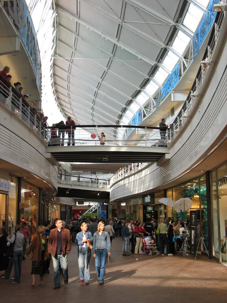 Centrum Manufaktura